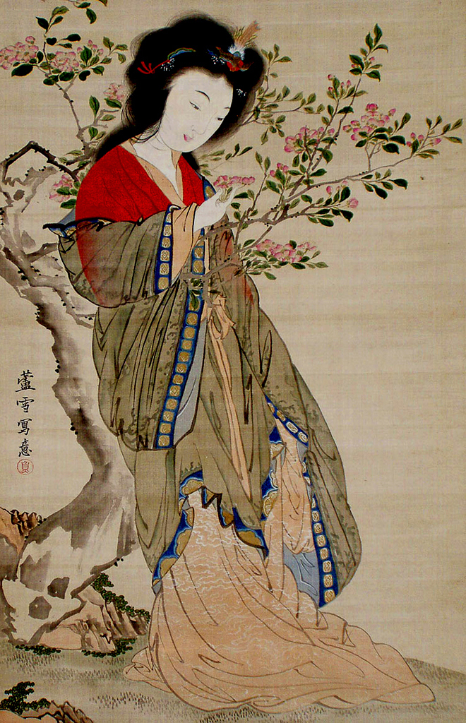 中文（香港）: 長澤蘆雪筆『楊貴妃図』（美人画：中国伝説上の人物画）絹本 56x122